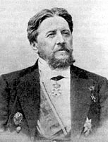 Сюзор Павел Юльевич